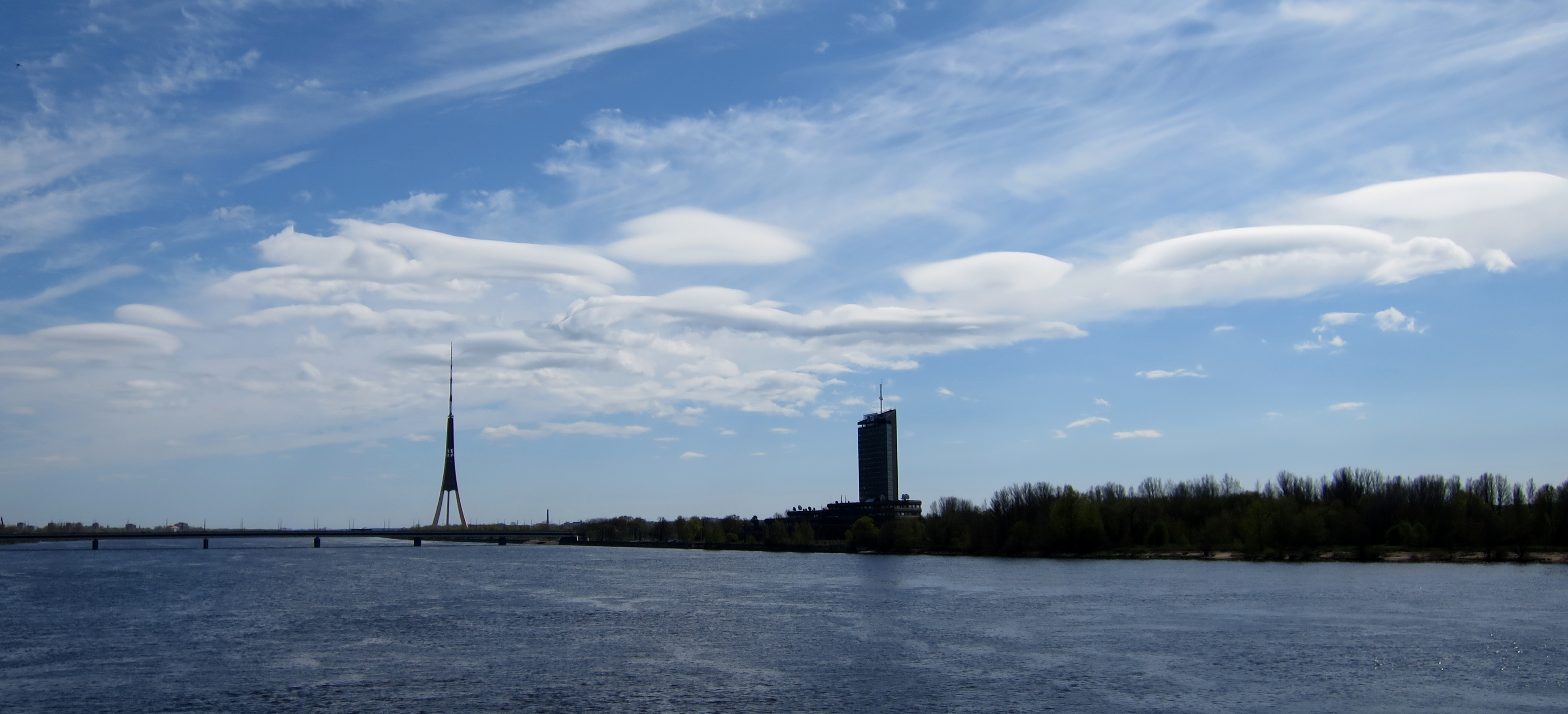 Lēcveida mākoņi virs Rīgas.